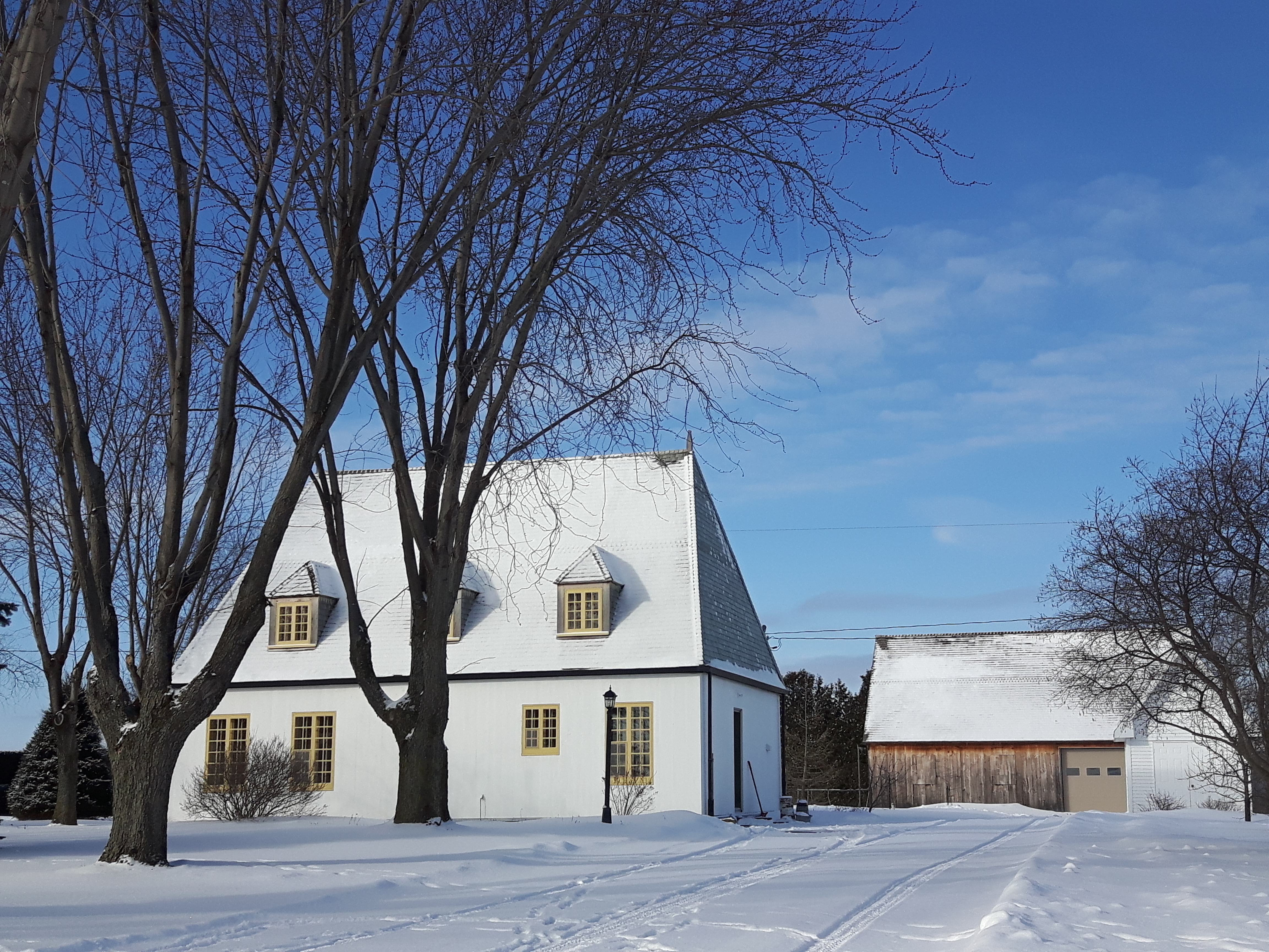 Maison à Saint-Michel, Montérégie, Québec.